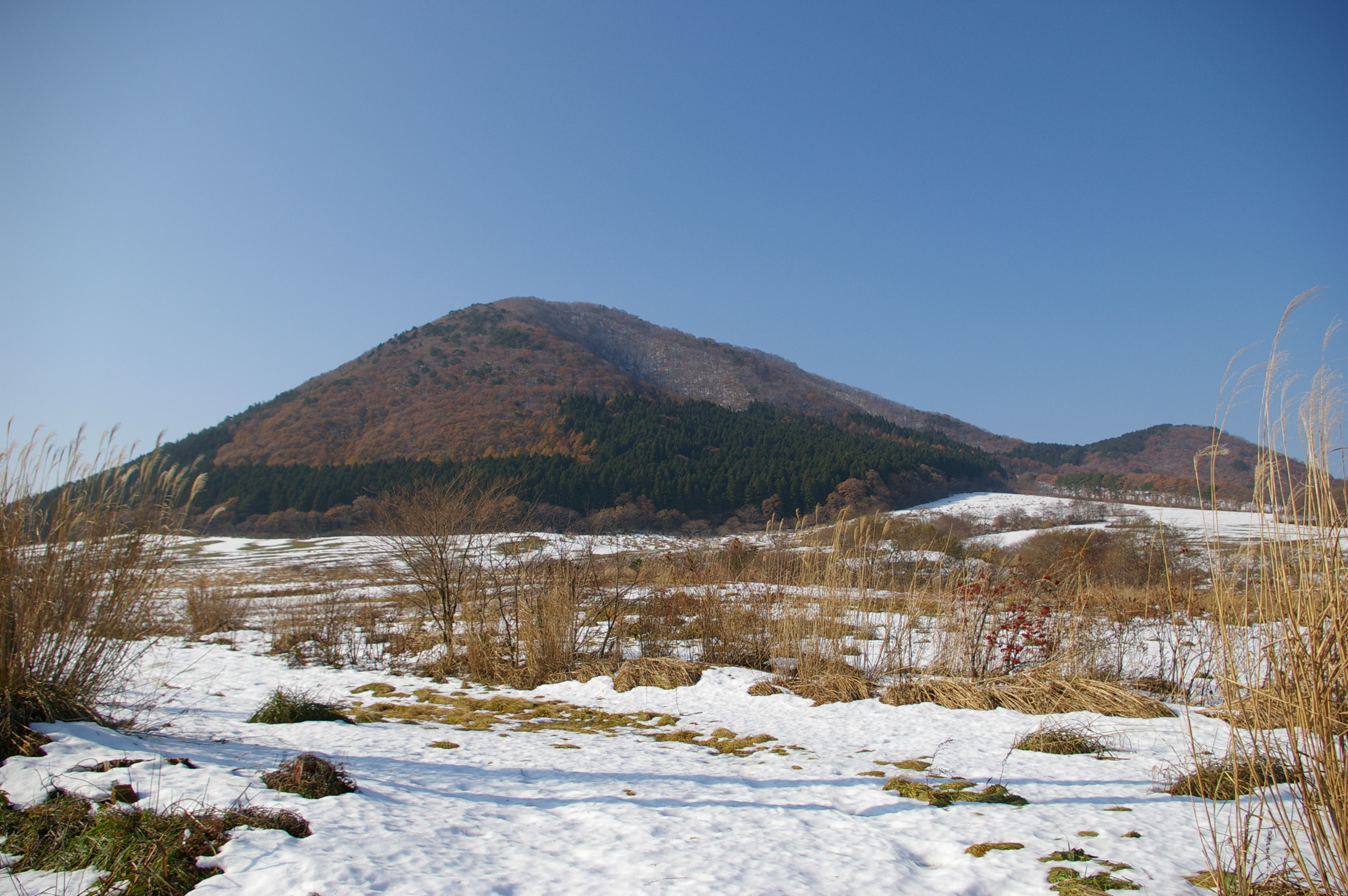 Yakuraisan